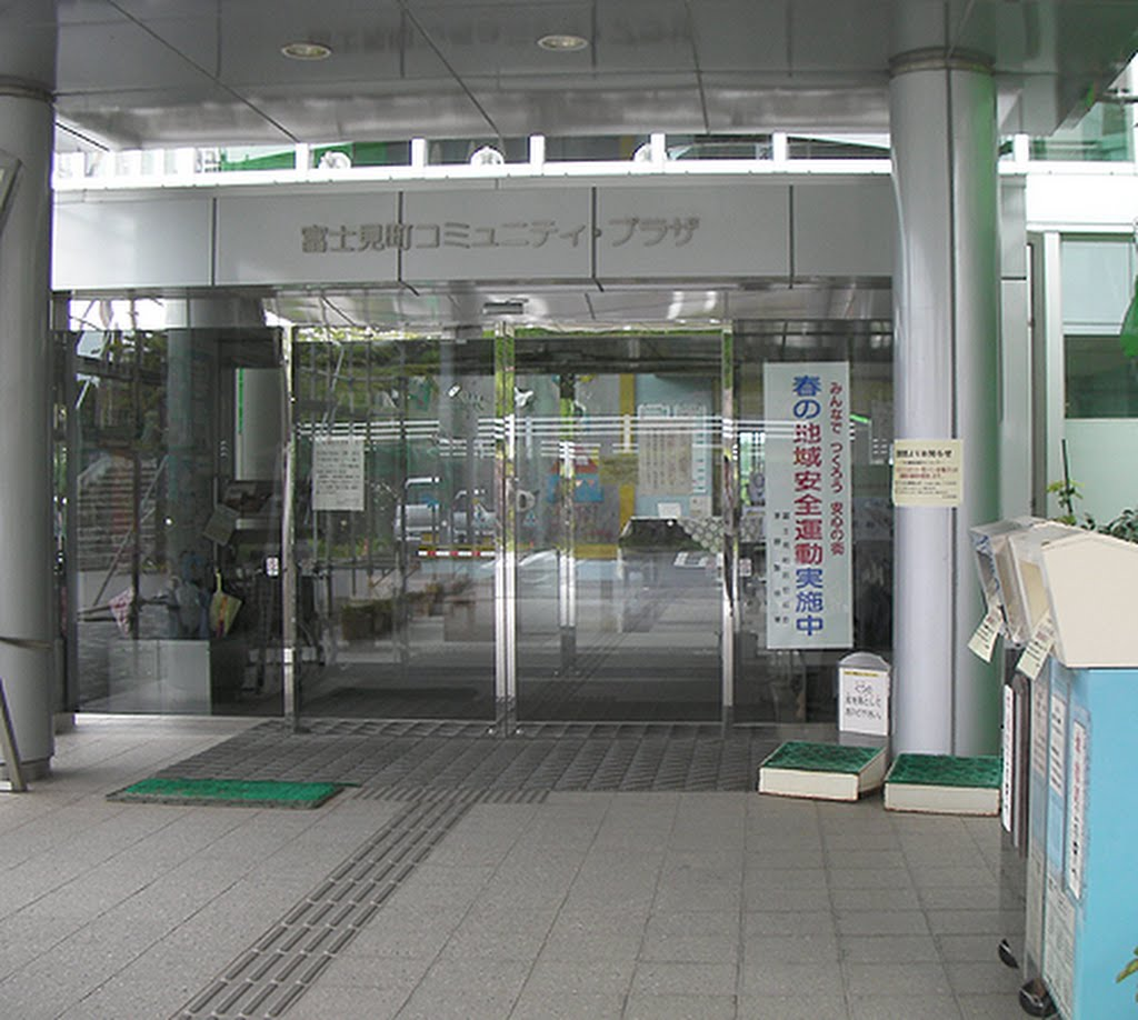 長野県諏訪郡の富士見町図書館。